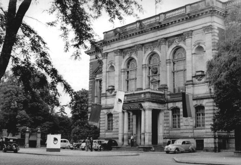 Zentralbild-Biscan Ra-Ho. 25.6.1953 Erich-Weinert-Haus in Magdeburg Am Dienstag wurde in Magdeburg durch den Generalsekretär der Gesellschaft für Deutsch-Sowjetische Freundschaft, Gottfried Grünberg, das Haus der Kultur in "Erich-Weinert-Haus der Deutsch-Sowjetischen Freundschaft" umbenannt. Gleichzeitig wurde eine Erich-Weinert-Ausstellung eröffnet, die in Dokumenten und Bildern vom Leben des revolutionären Dichters und Sohnes der Stadt Magdeburg berichtet. UBz, Das "Erich-Weinert-Haus der Deutsch-Sowjetischen Freundschaft"."